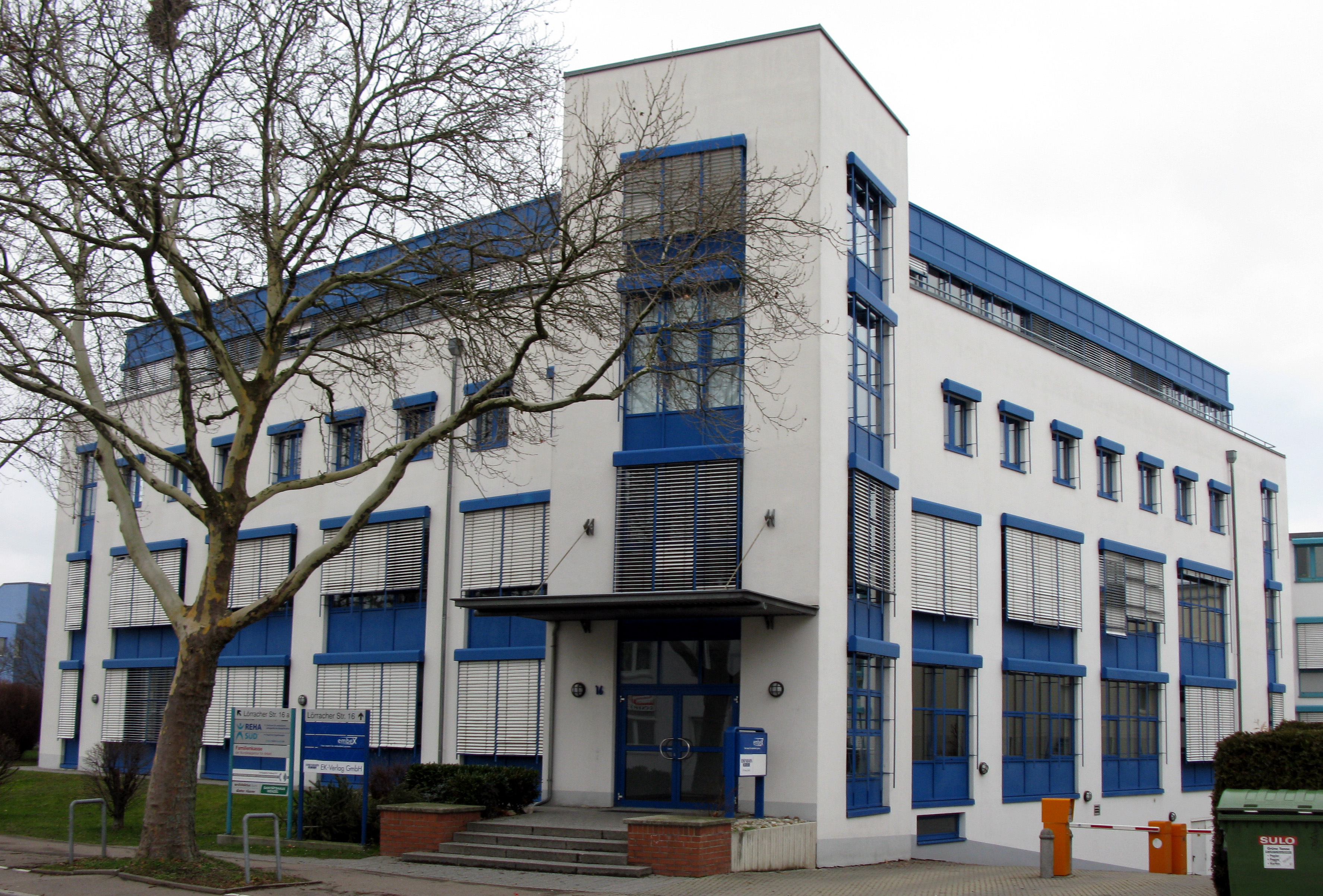 Lörracher Straße 16, Sitz der EK-Verlags GmbH